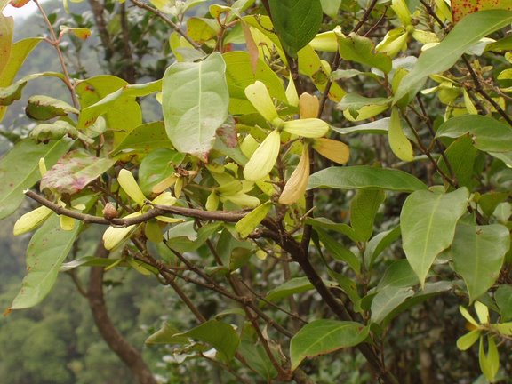 猿尾藤 螺旋槳狀翅果1